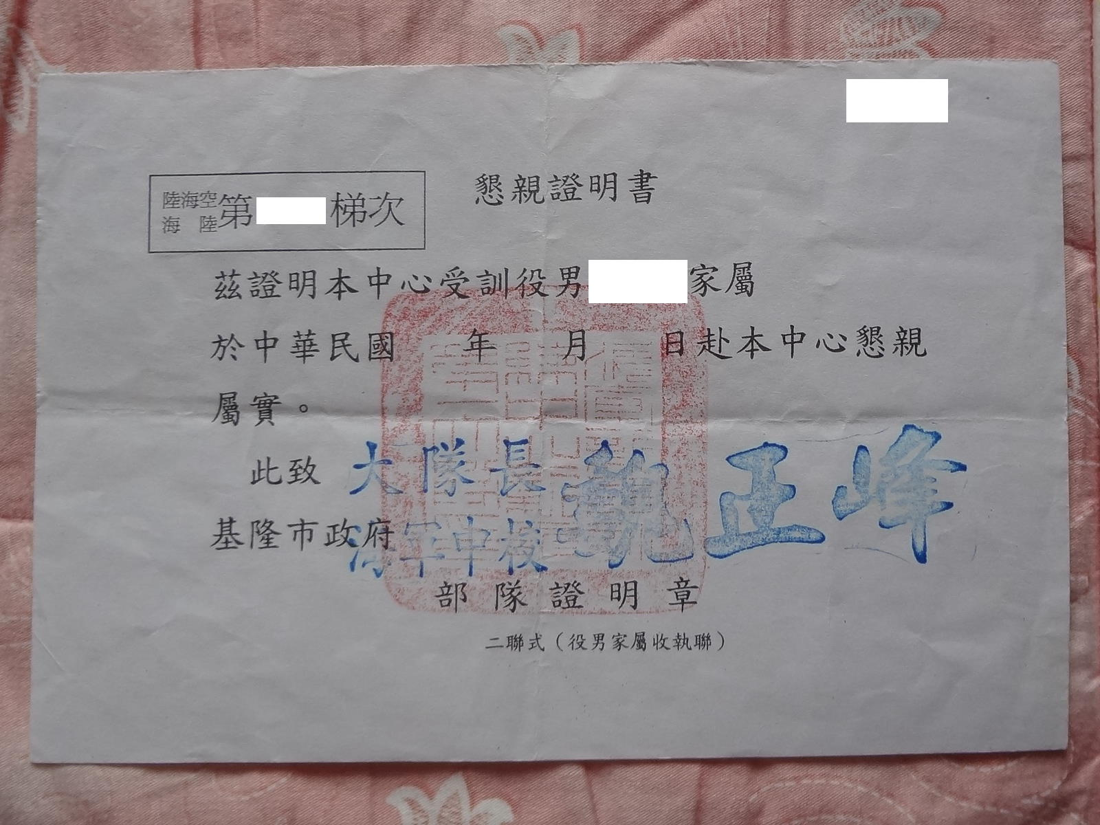 2008年中華民國海軍新兵訓練中心懇親證明書役男家屬收執聯，蓋印新兵第一大隊印（紅色）與新兵第一大隊大隊長簽字章（藍色）。